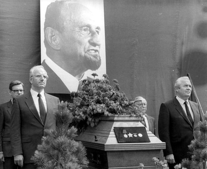 ADN-ZB Gahlbeck-16.5.86-BRD-Trauerfeier- Die SED-Delegation zu den Trauerfeierlichkeiten in Ingolstadt für den KPD-Funktionär Richard Scheringer während der Ehrenwache am Sarg des Verstorbenen. Vern, 1.: Werner Jarowinsky, Mitglied des Politbüros und Sekretär des ZK der SED; r.: Ewald Moldt, Leiter der Ständigen Vertretung der DDR in der BRD; l.: Gunter Rettner, Abteilungsleiter des ZK der SED.